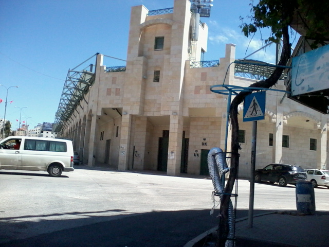 ملعب الحسين في مدينة الخليل